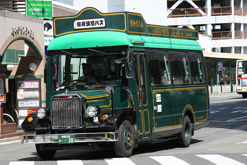 Shizutetsu Justline's Fantastic bus "Sunpu-Roman Bus Takechiyo-kun" at Shin-Shizuoka Station, Shizuoka, Shizuoka, Japan.